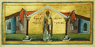 Свт. Евстафий, еп. Антиохийский. Миниатюра из Минология. Нач. XI в. (ГИМ. Син. греч. № 183. Л. 103r)